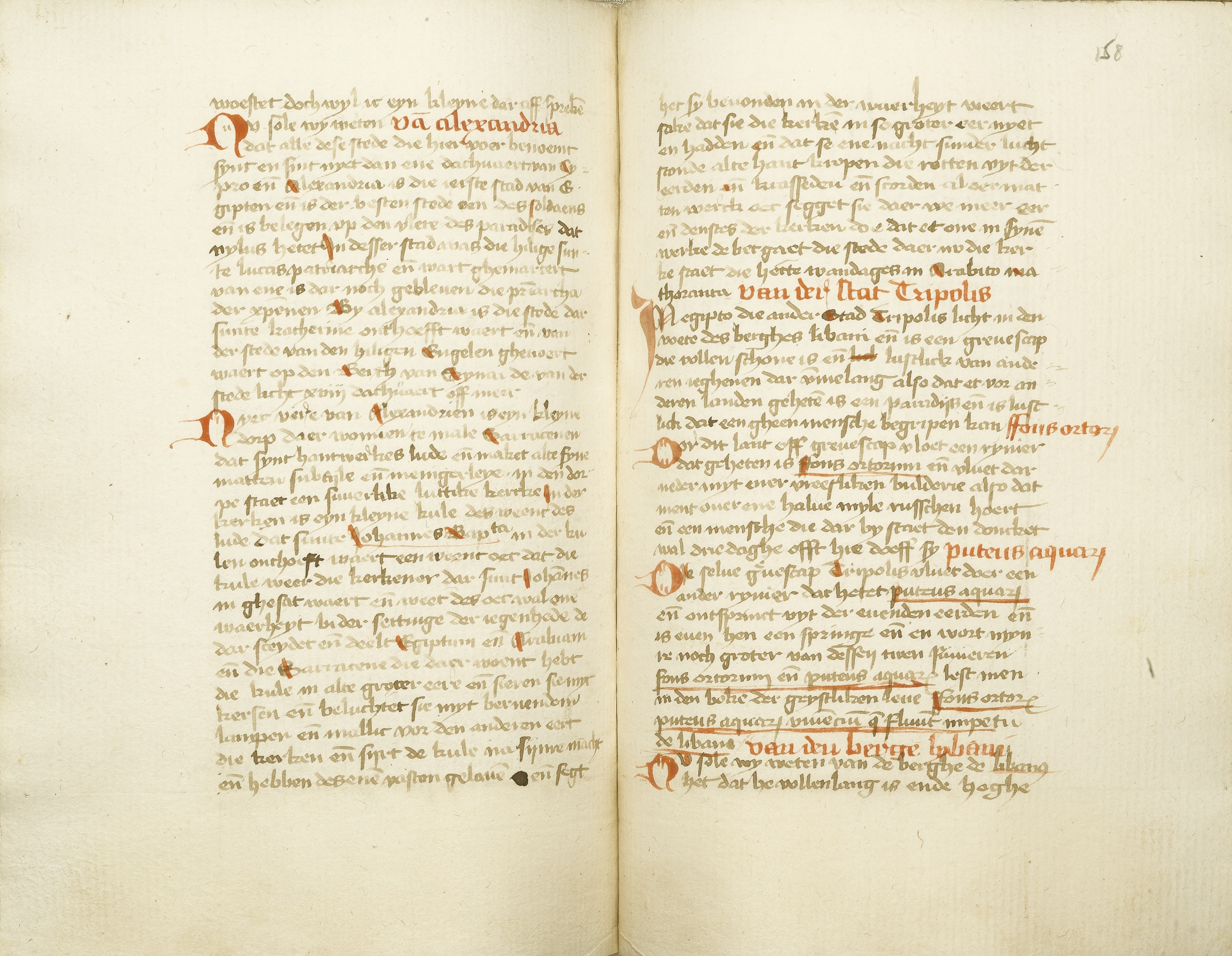 Handschrift (entstanden in den Niederlanden) der niederdeutschen Übersetzung des Reiseberichts des Ludolf von Sudheim, angeboten Sotheby's 6.12.2011 in London Lot 44, Bl. 157r-158